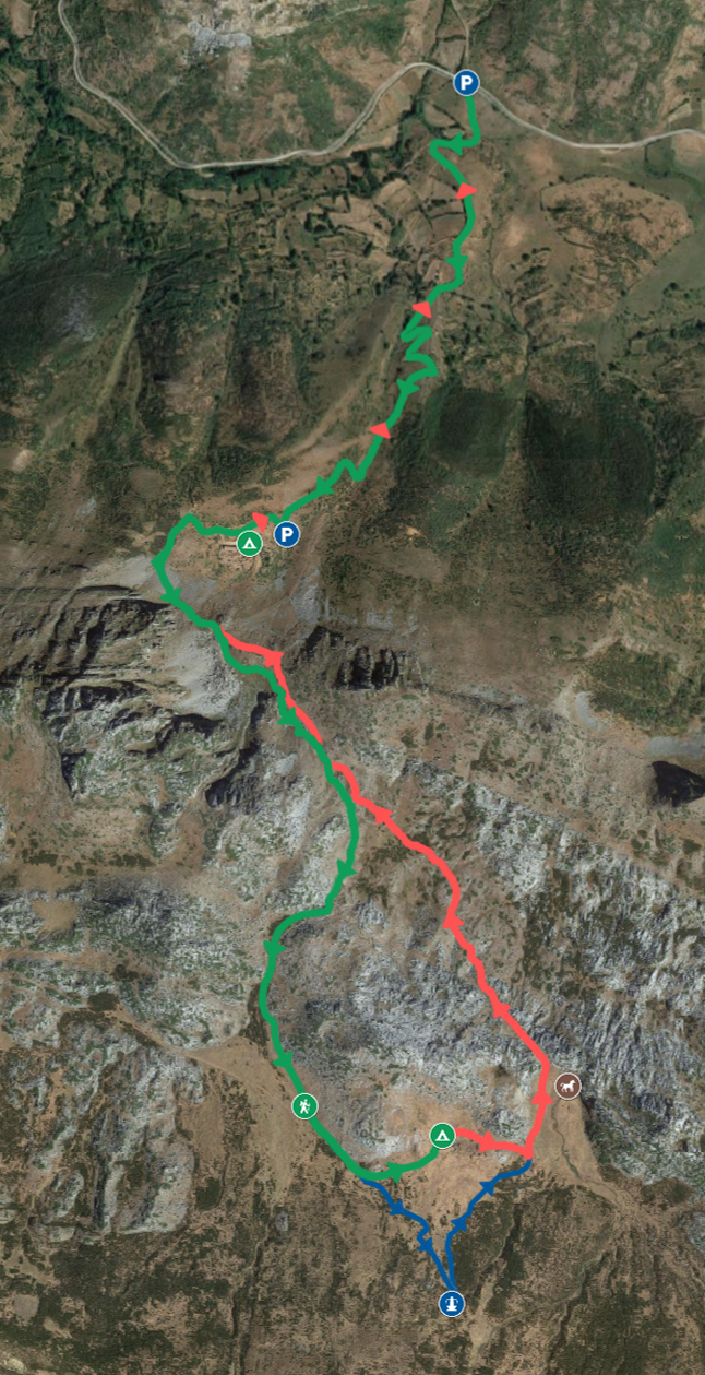 Ruta a pie con inicio desde la Collada de Uvierzo hasta la fuente de Sancenas y bajada por la llamada Peña del Sumidero